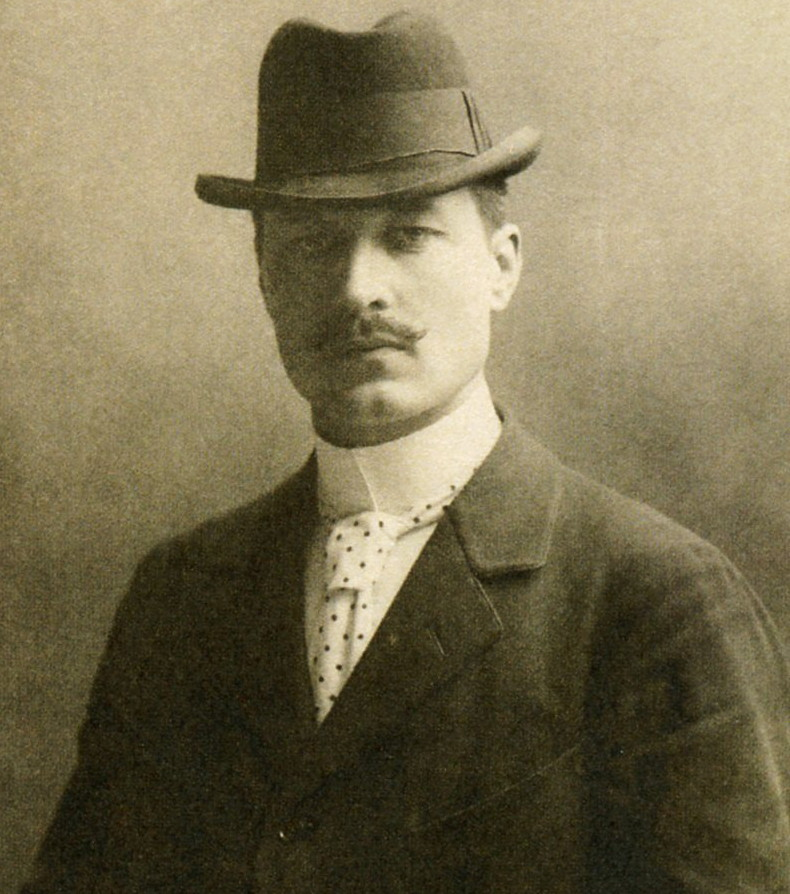 Ragnar Östberg i mars 1896